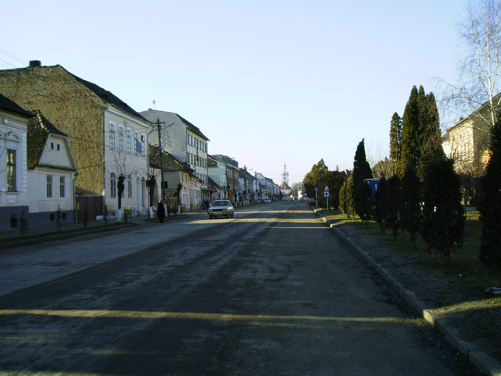 Der Freiheit Platz in Székelykeresztúr (Cristuru Secuiesc)